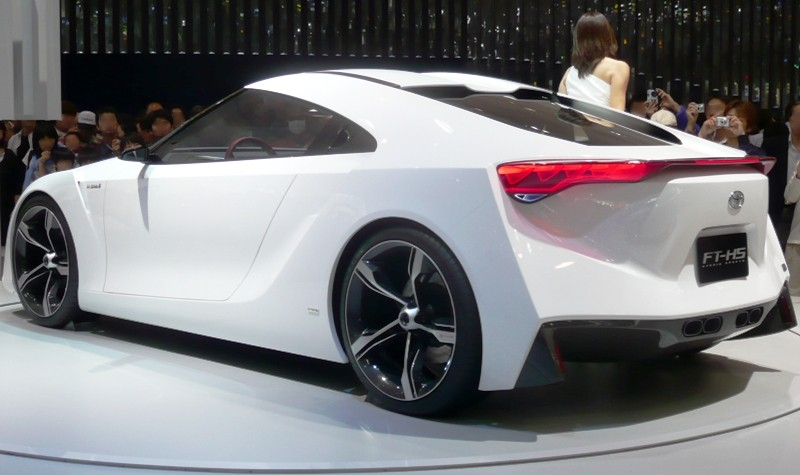 Toyota FT-HS.